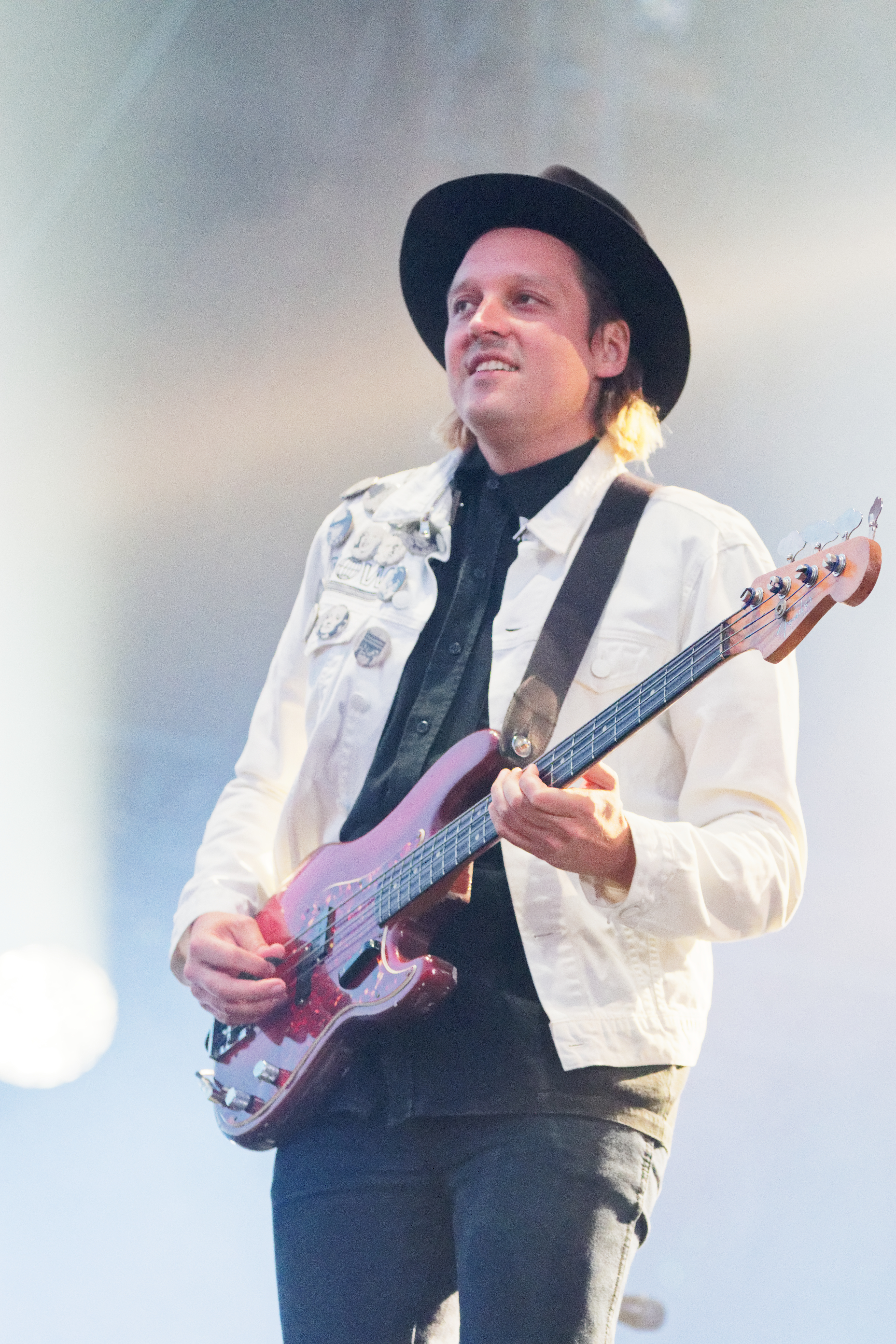 Arcade Fire en concert lors du festival des vieilles charrues 2017.